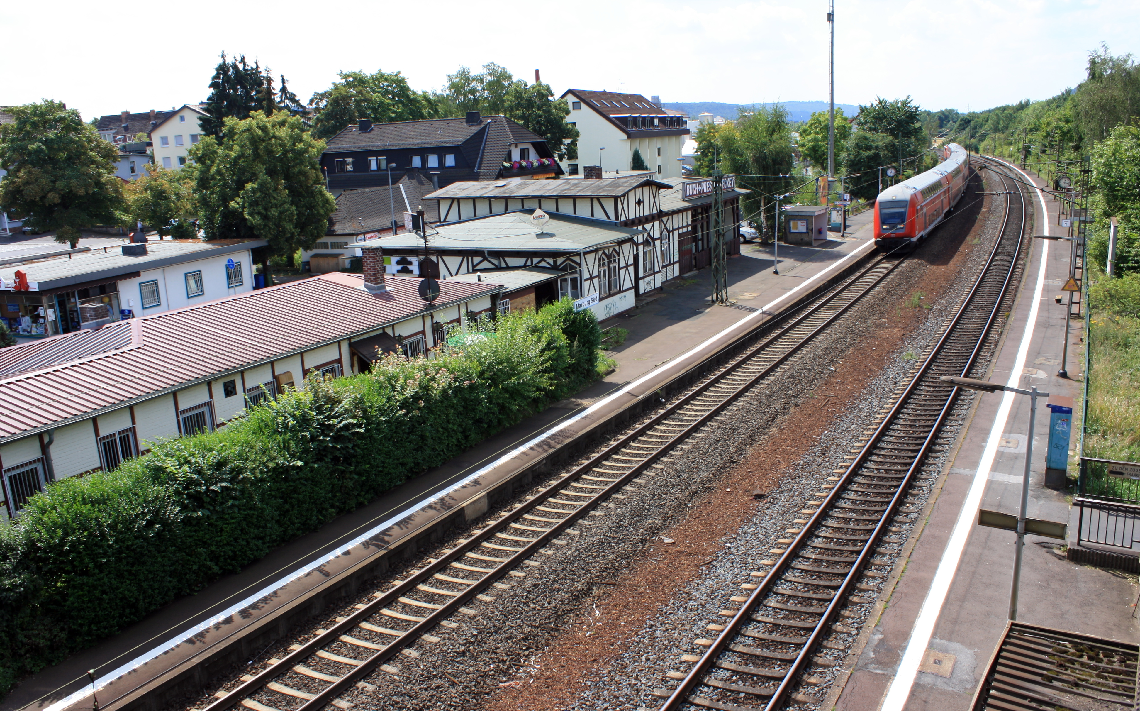 Marburg Südbahnhof (Frauenbergstr. 1, 35039 Marburg). Blick von der Überführung. Links: das nicht mehr in Betrieb befindliche Bahnhofsgebäude (Stand 2011). Rechts: Abgang von der Überführung auf den Bahnsteig. Linkes Gleis Richtung Kassel - rechtes Gleis Richtung Gießen